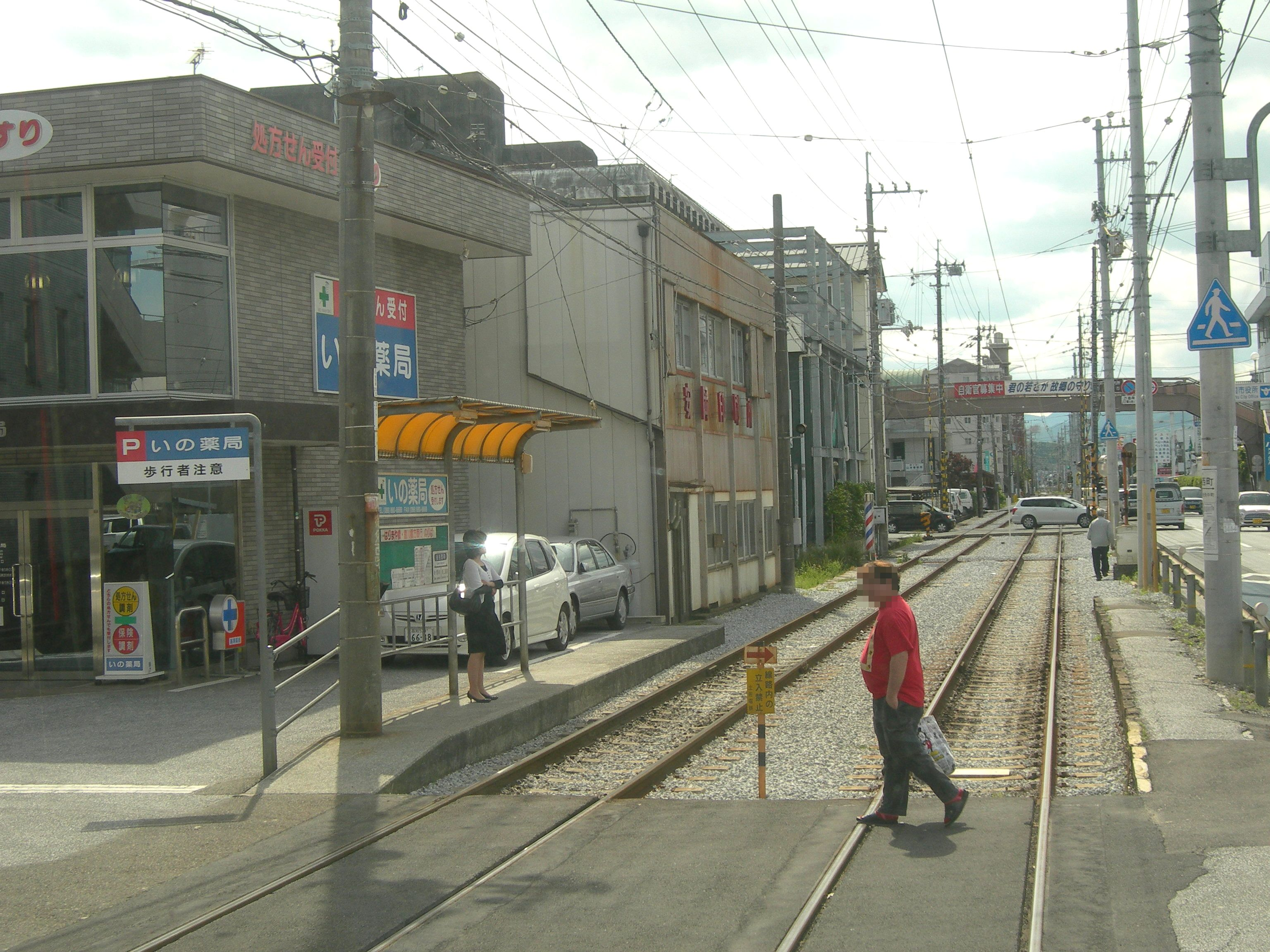 土佐電気鉄道後免西町電停